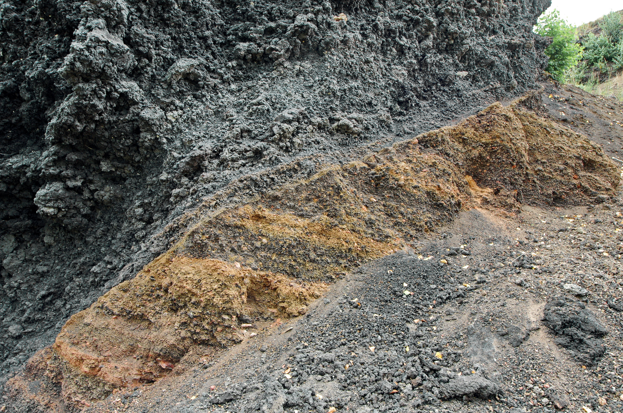 Národní přírodní památka Železná hůrka v okrese Cheb, pohled na diskordantně nasedající vrstvy